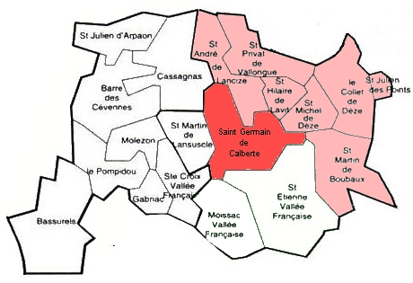 carte de Saint-Germain-de-Calberte dans la communauté de communes de la Vallée Longue et du Calbertois en Cévennes.